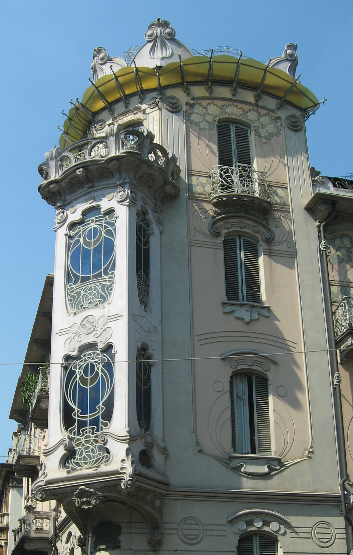 Casa Fenoglio-La Fleur. Il capolavoro di Fenoglio, ma anche uno dei migliori e piú caratteristici liberty di Torino. È situata nell'angolo tra corso Francia e via principi d'Acaja. È visibile la stupenda finestratura del bovindo, sovrastata dal balcone coperto. Tra le due vetrate colorate il pendaglio con la data in cifre romane: MCM III 1903, l'anno di costruzione.